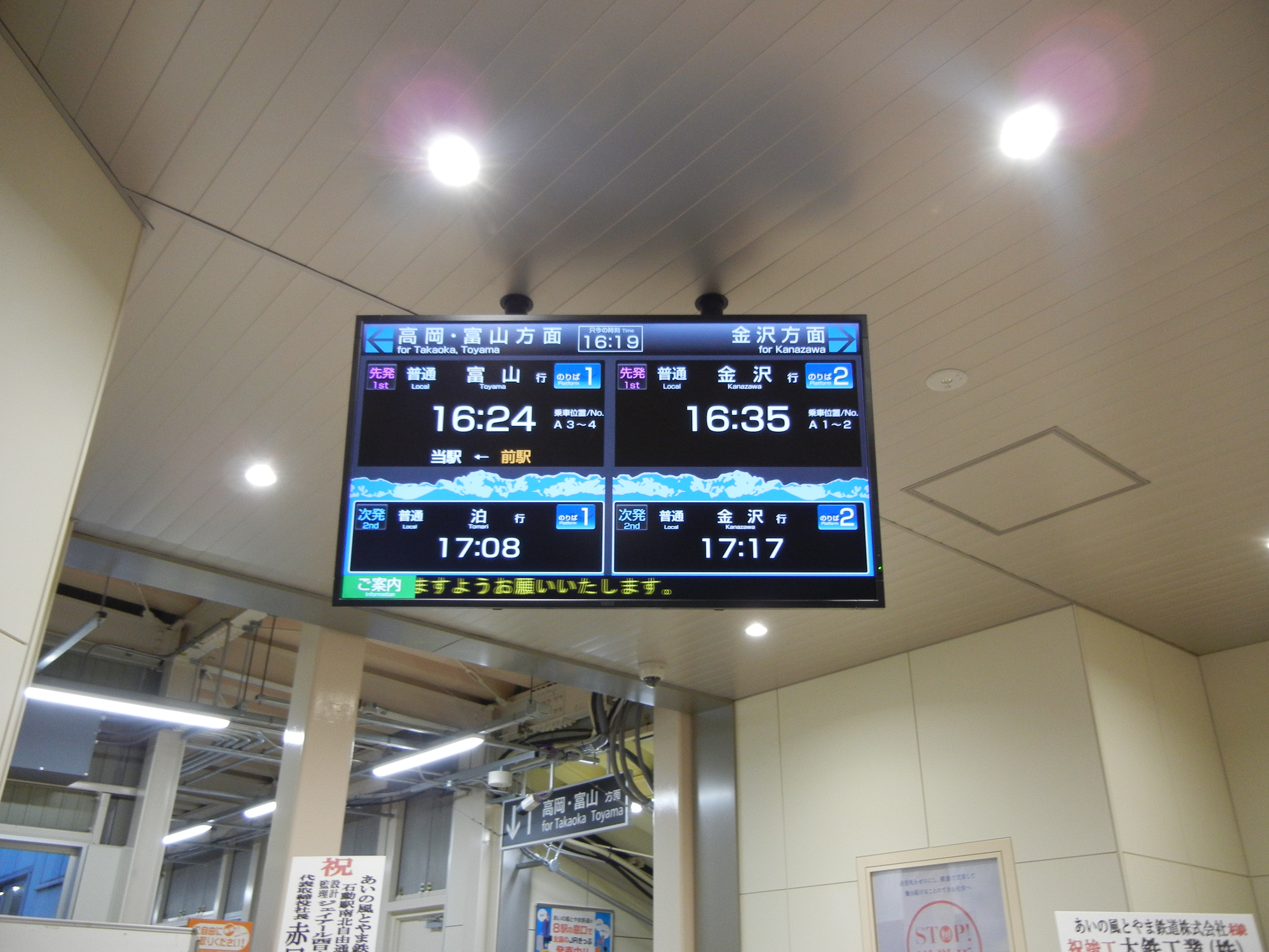 あいの風とやま鉄道にある駅の発車標。液晶ディスプレイで表示されている。